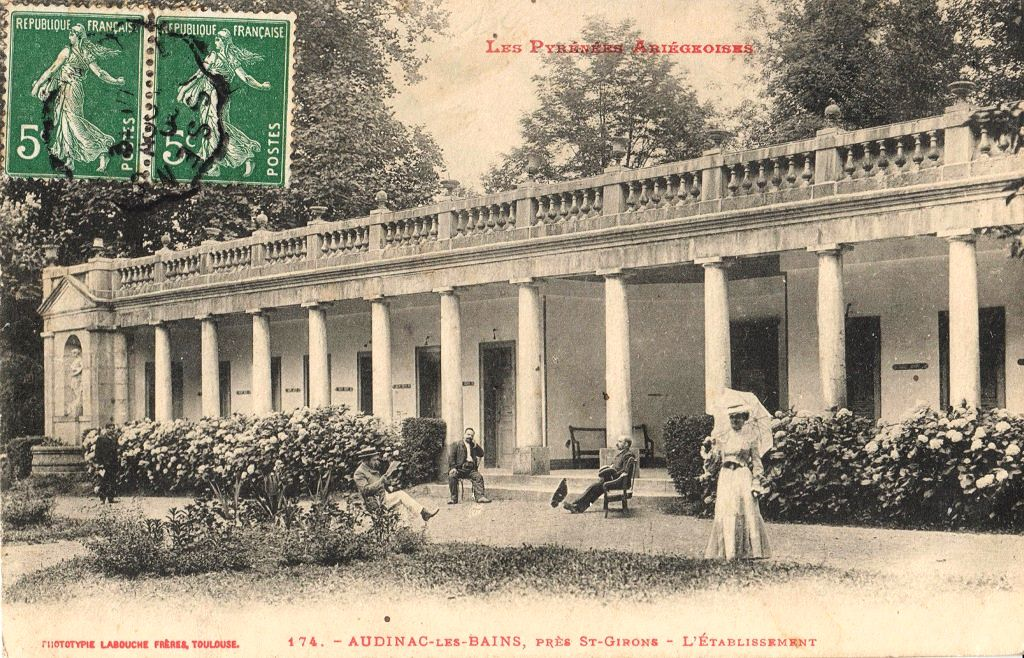 Carte postale d'Audinac-les-Bains: l'établissement